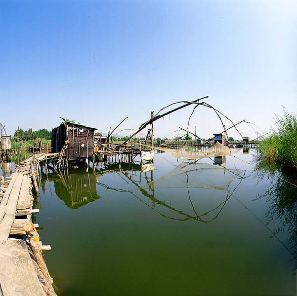 Bojana River